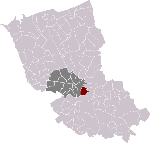 Locatie gemeente Sint-Mariakappel in arrondissement Duinkerke. Zelfgemaakt. Location of Sainte-Marie-Cappel municipality in the arrondissement of Dunkirk. Self made. Localisation de la commune de Sainte-Marie-Cappel dans l'arrondissement de Dunkerque. Fait moi-même.